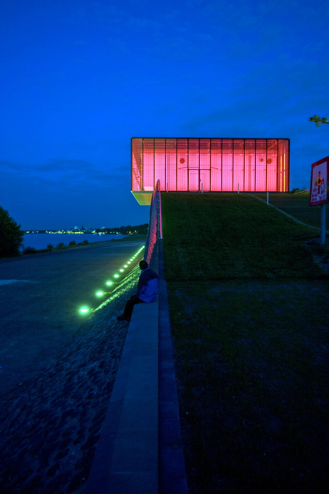 Hochwasserpumpwerk Schönhauser Straße, Köln